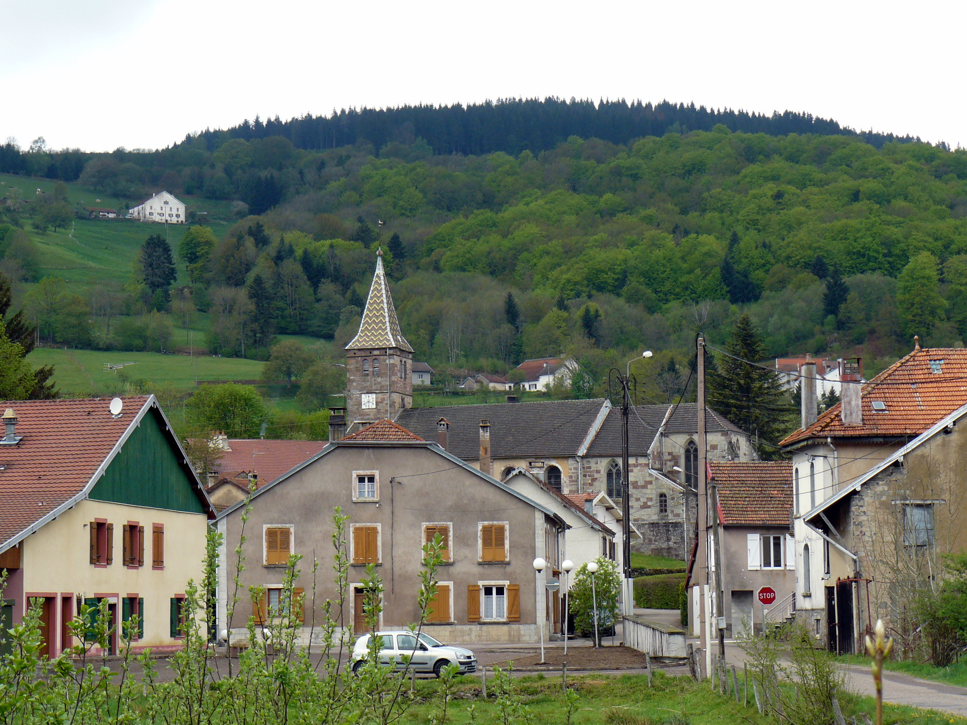 Vue de Corravillers (Haute-Saône, France)